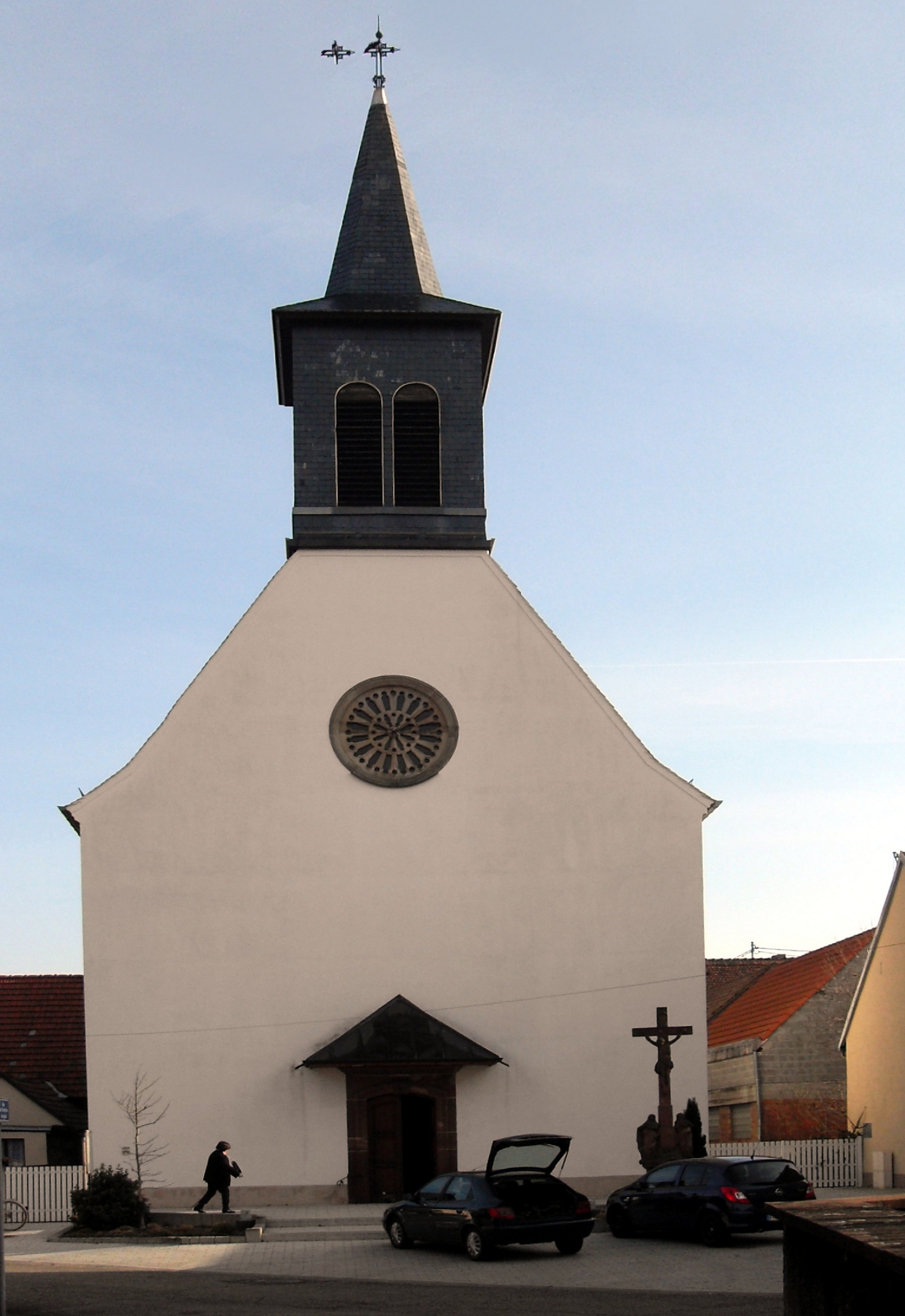 L'église Saint-Sixte de Hœrdt